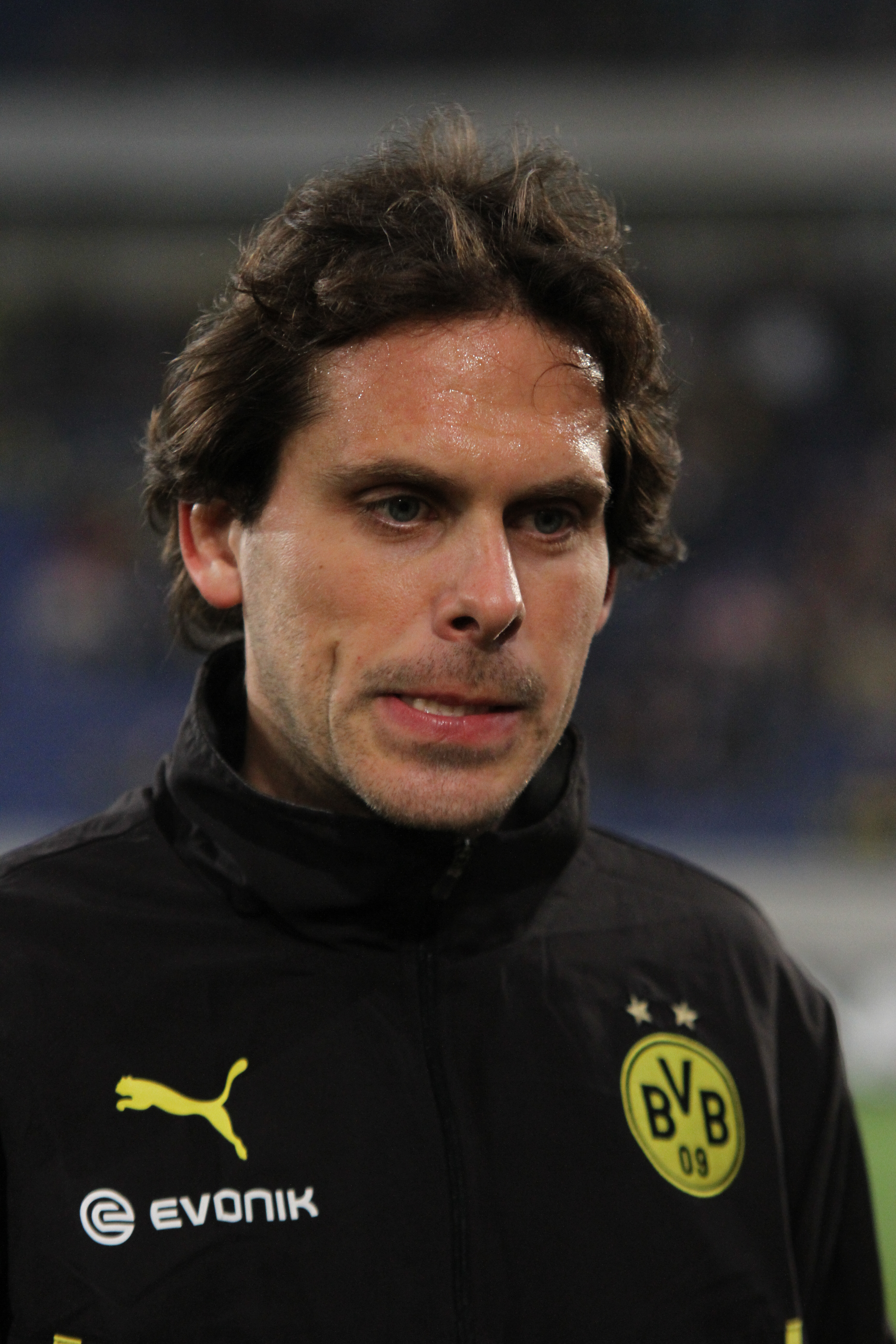 Manuel Friedrich (Borussia Dortmund)